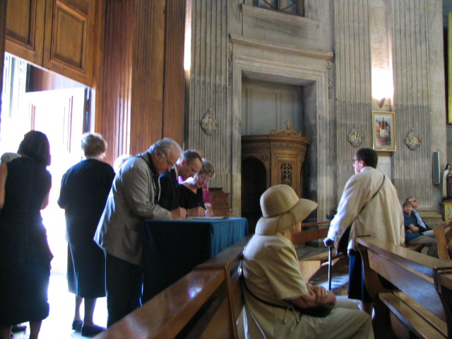 Władysław Żeleński's funeral